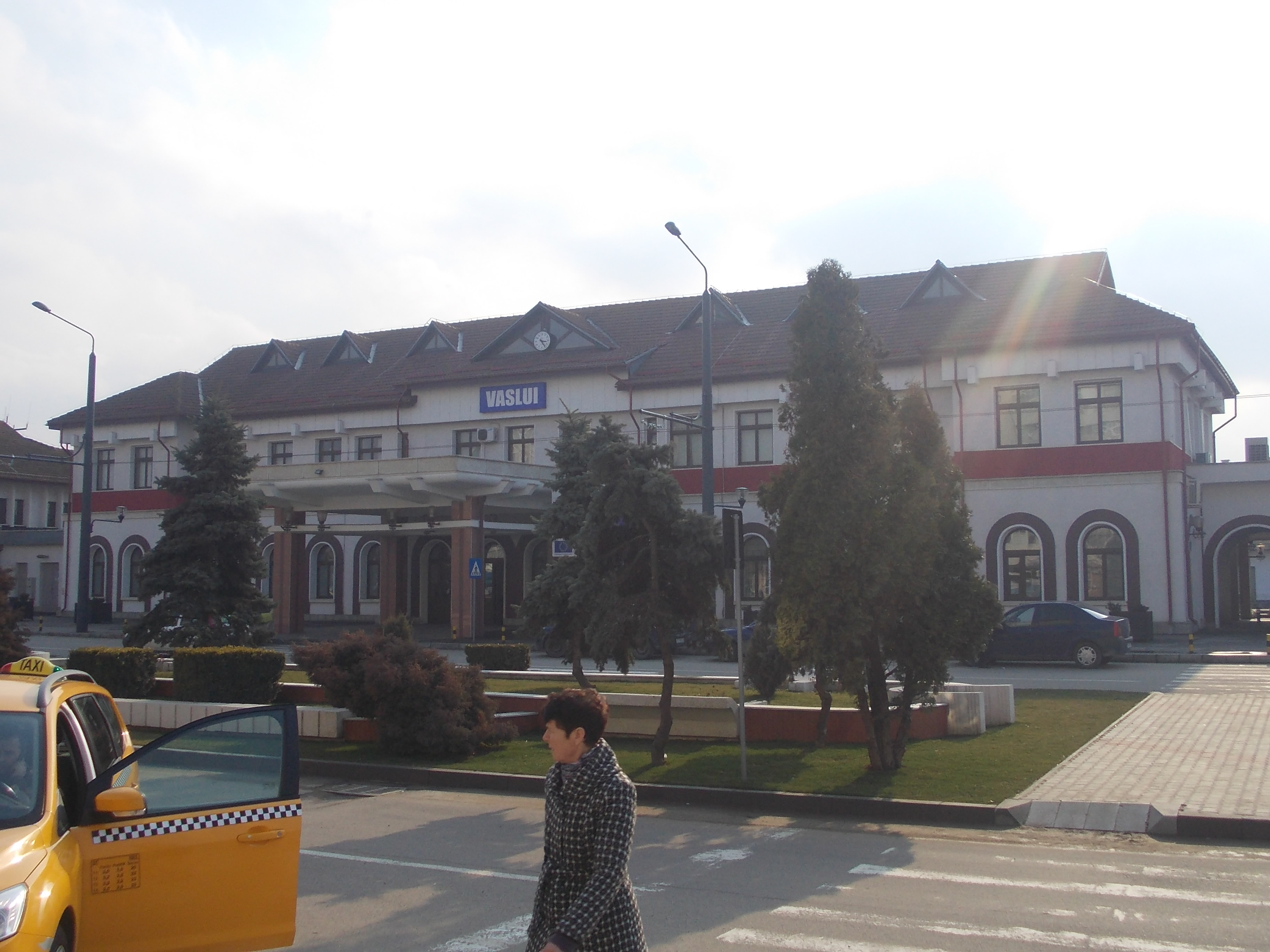 gara vaslui